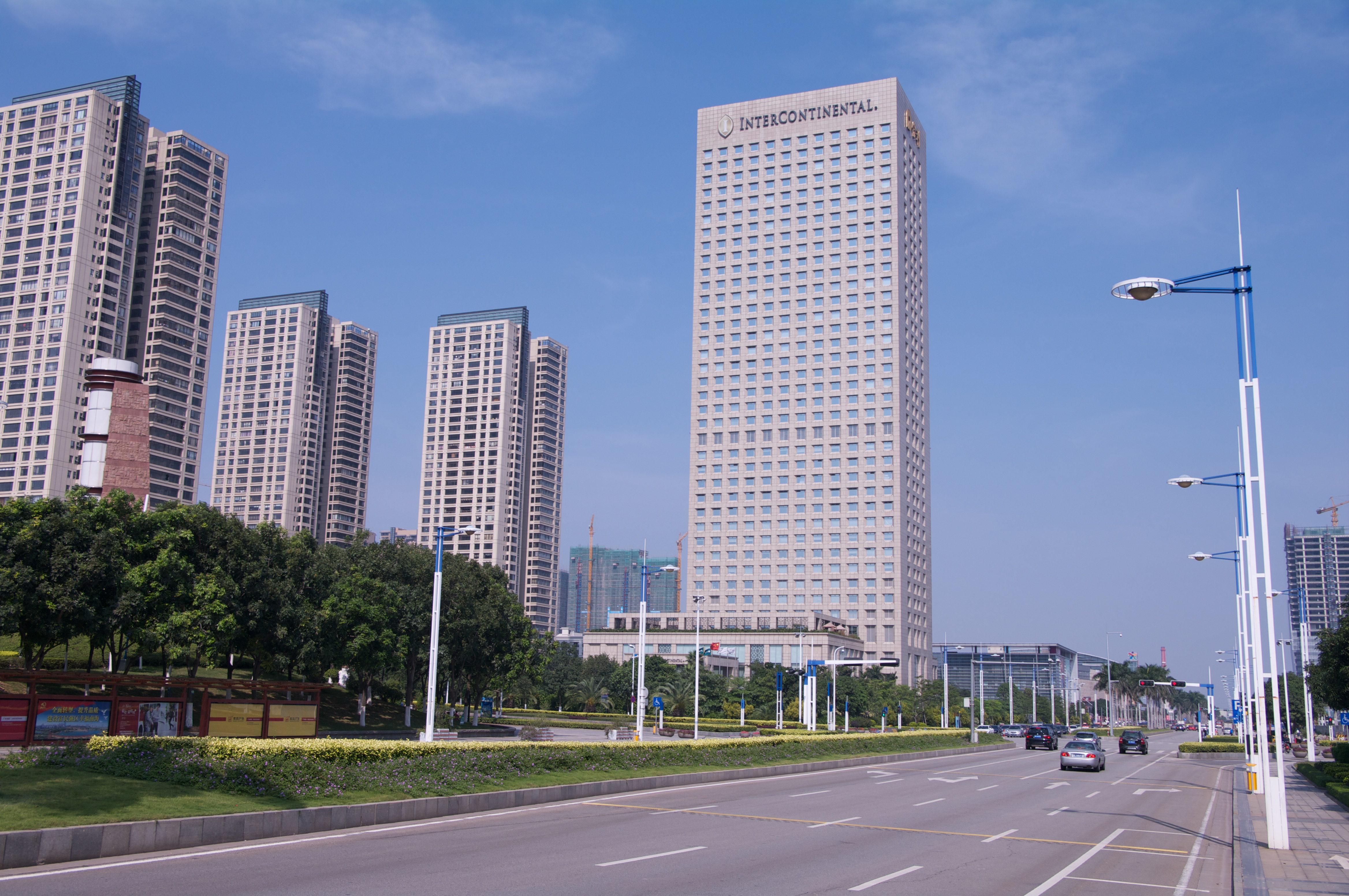 桂城街道的第一家五星级酒店